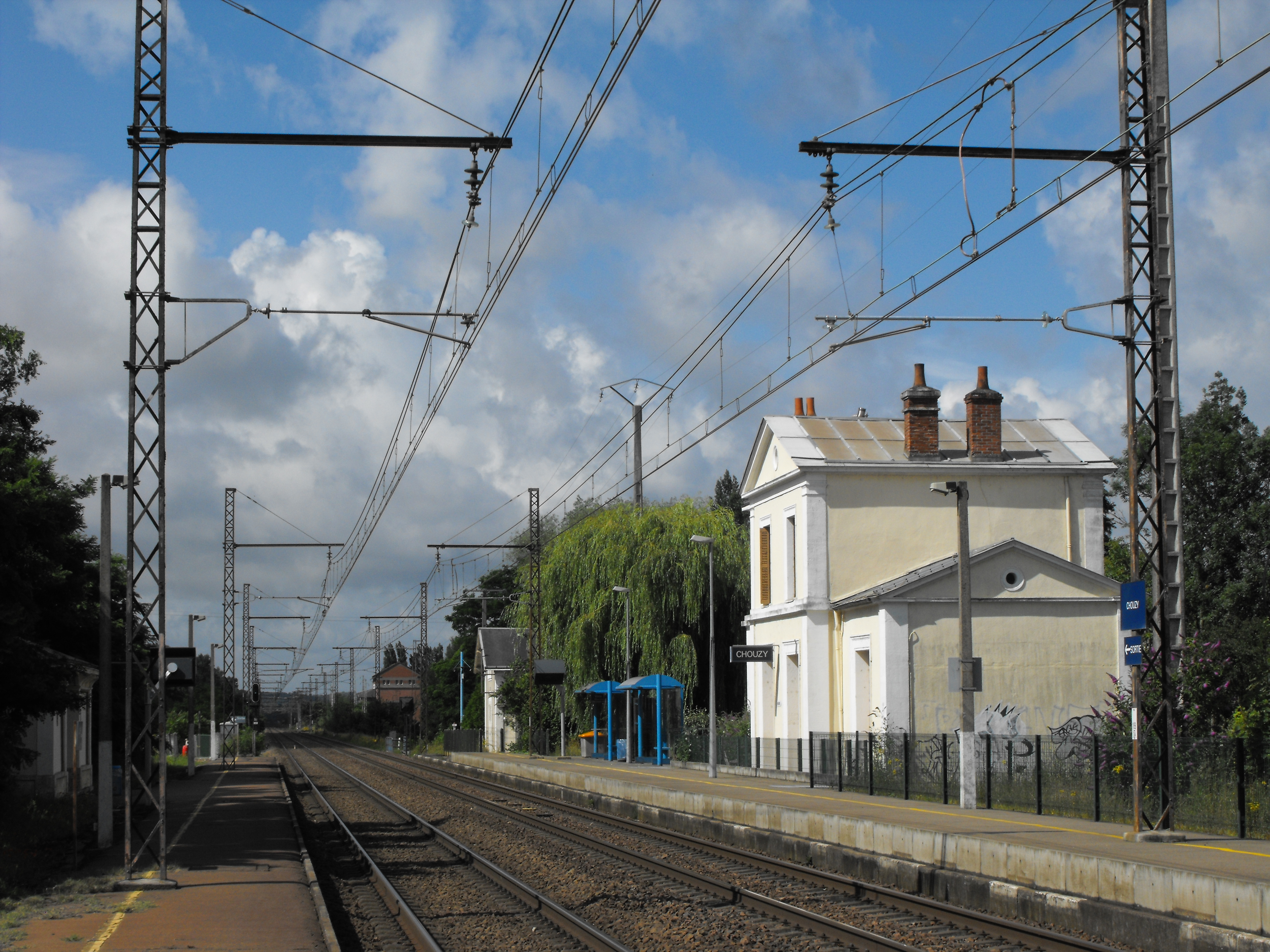 Gare de Chouzy-sur-Cisse, France, Loir-et-Cher (41)